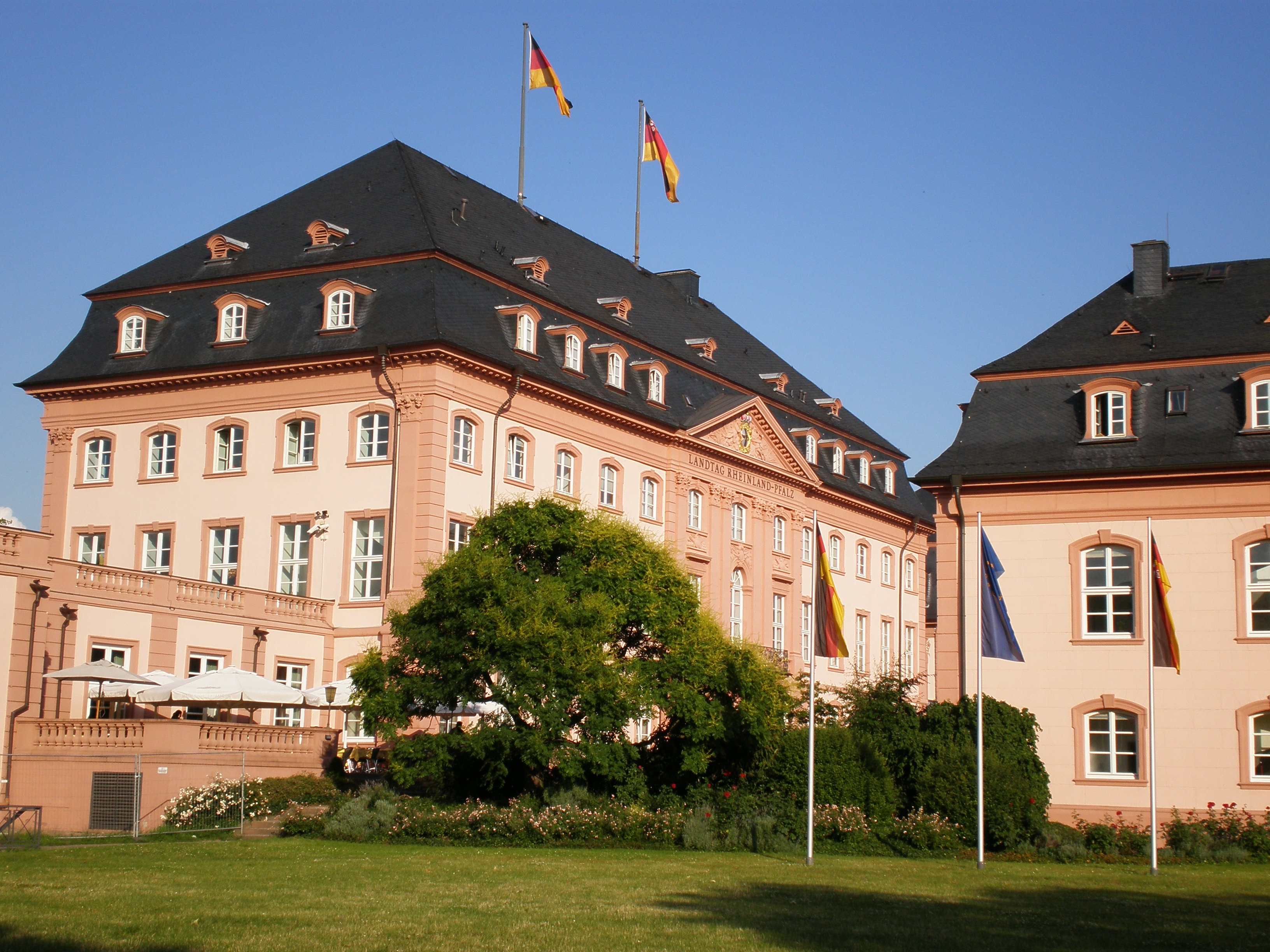 Landtag des Landes Rheinland-Pfalz im Deutschhaus